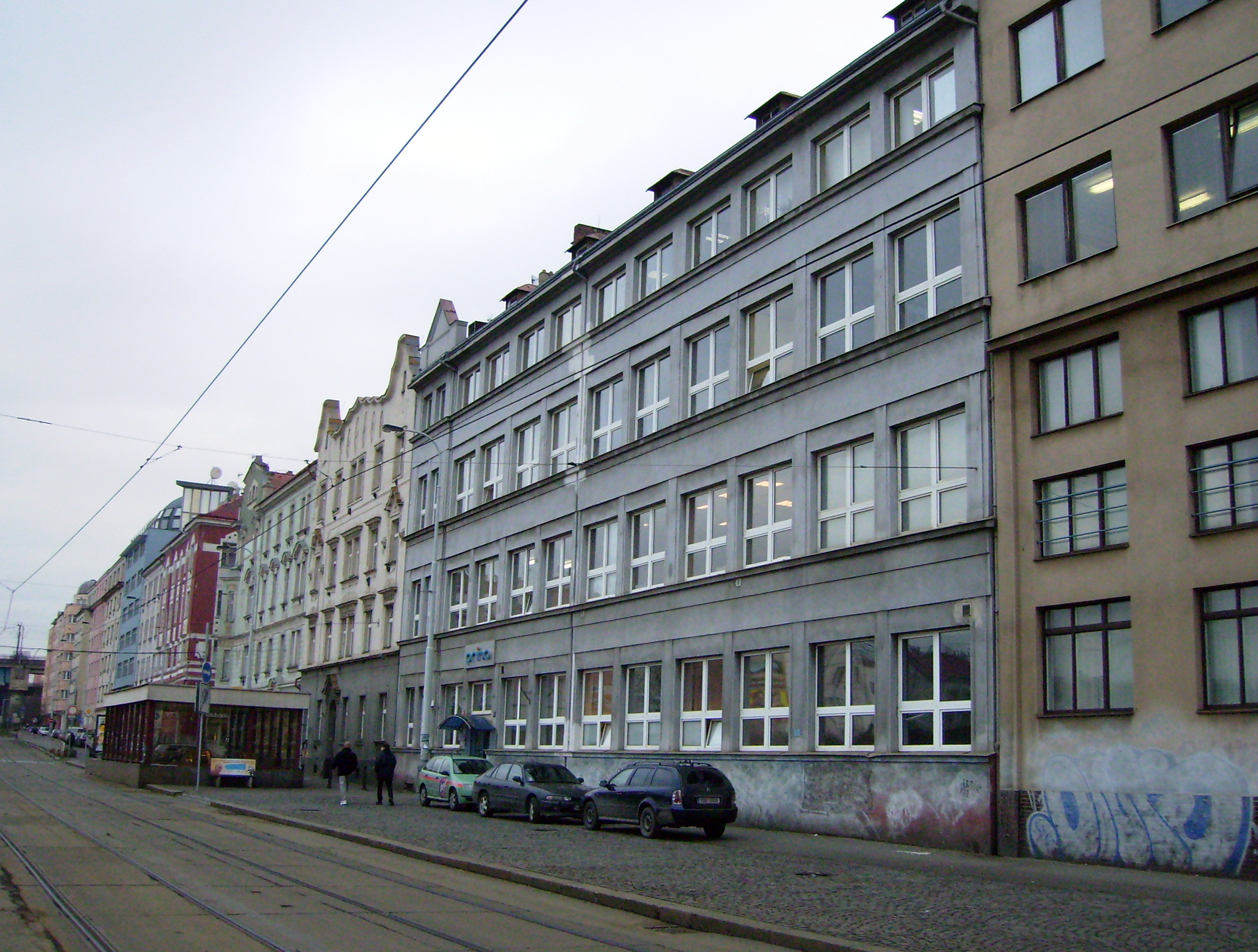 Sídlo TV Prima v Praze 8 na Palmovce.